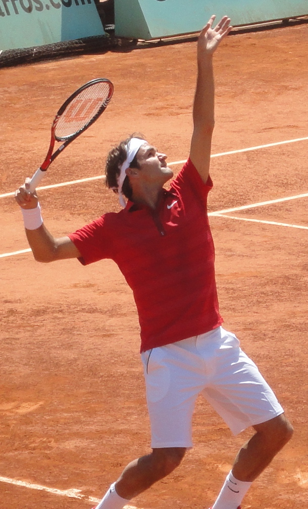 Roger Federer au service pendant son 3e tour de Roland-Garros en 2011